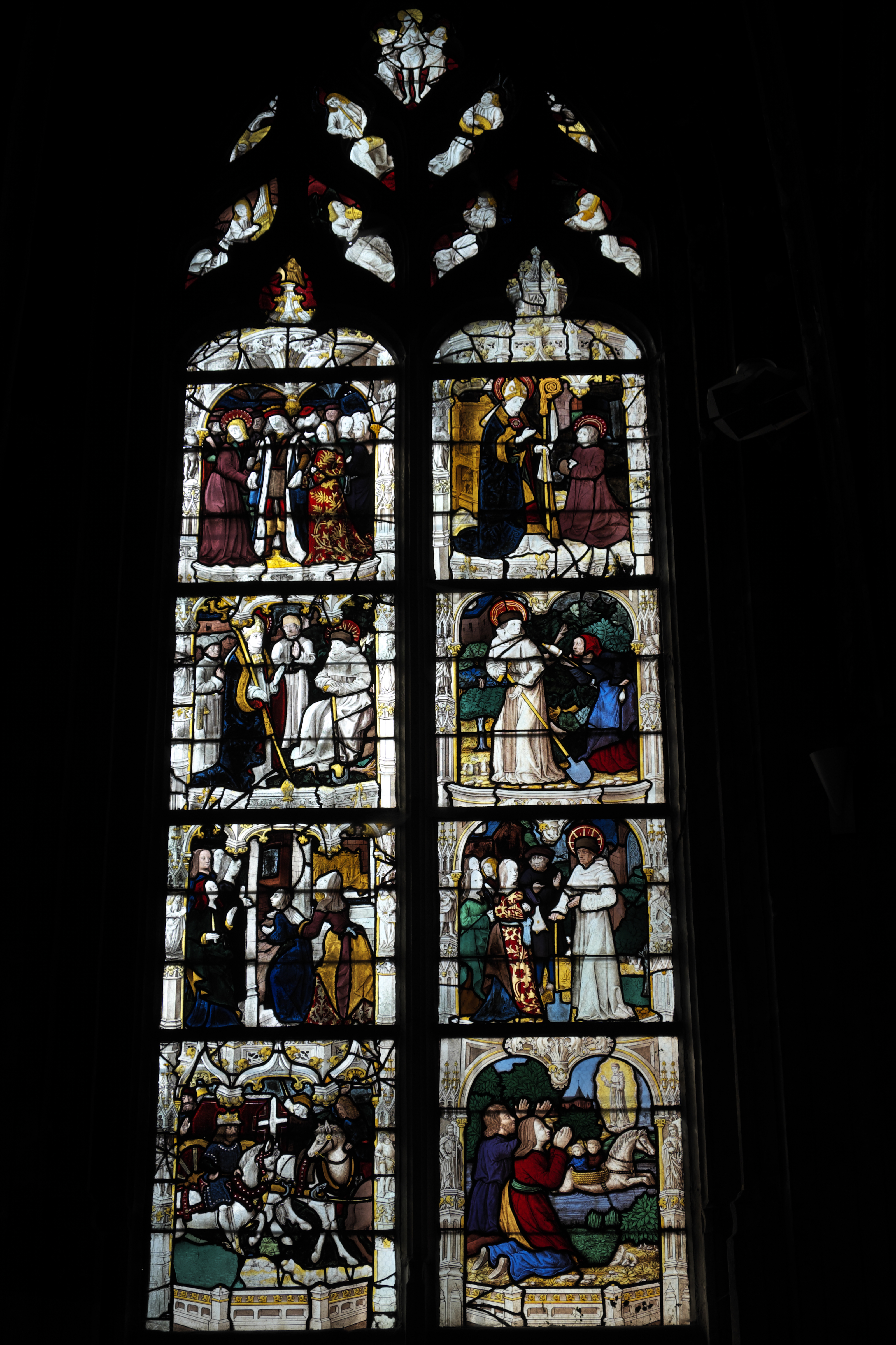 Katholische Kirche Saint-Pierre in Dreux im Département Eure-et-Loir (Centre-Val de Loire/Frankreich), Bleiglasfenster (baie 6) aus dem frühen 16. Jahrhundert; Darstellung: Legende des hl. Fiacrius